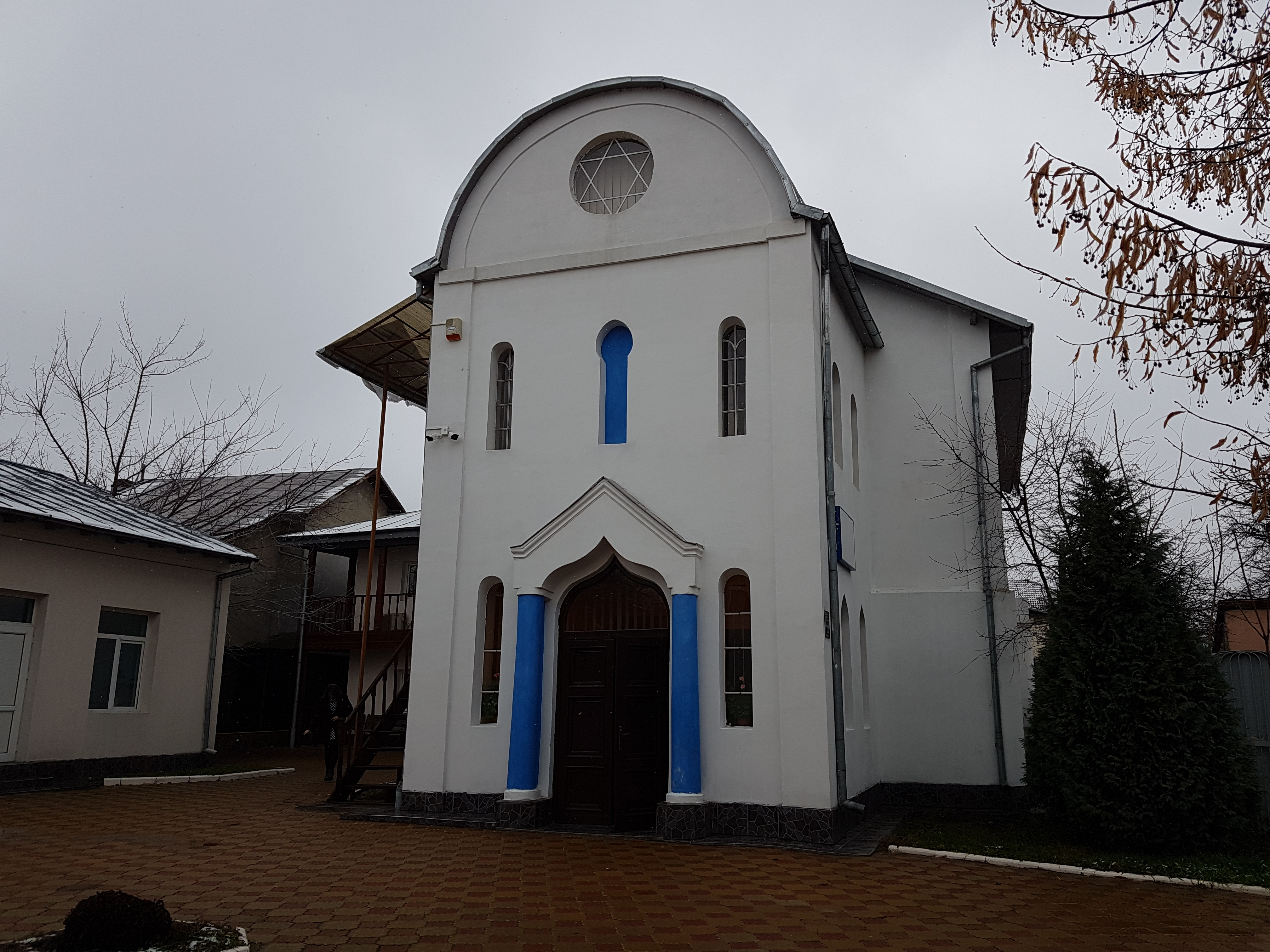 Sinagogă